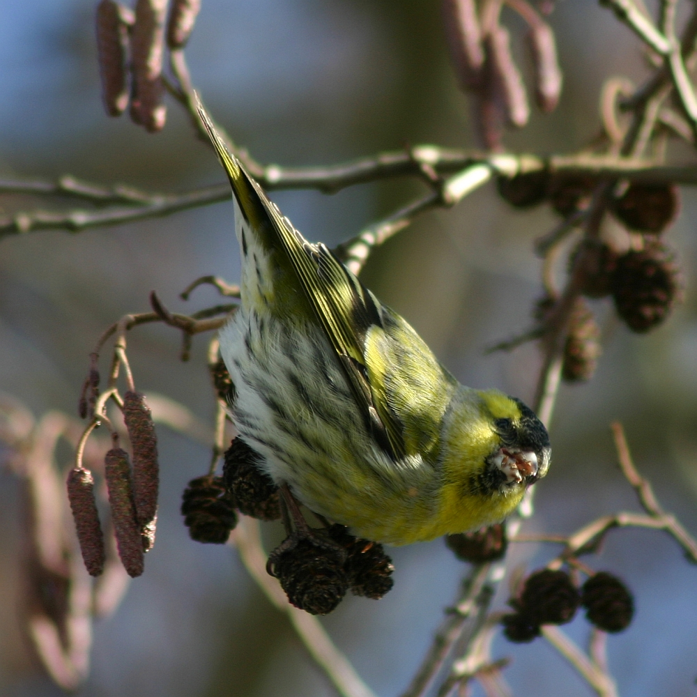 Erlenzeisig Männchen